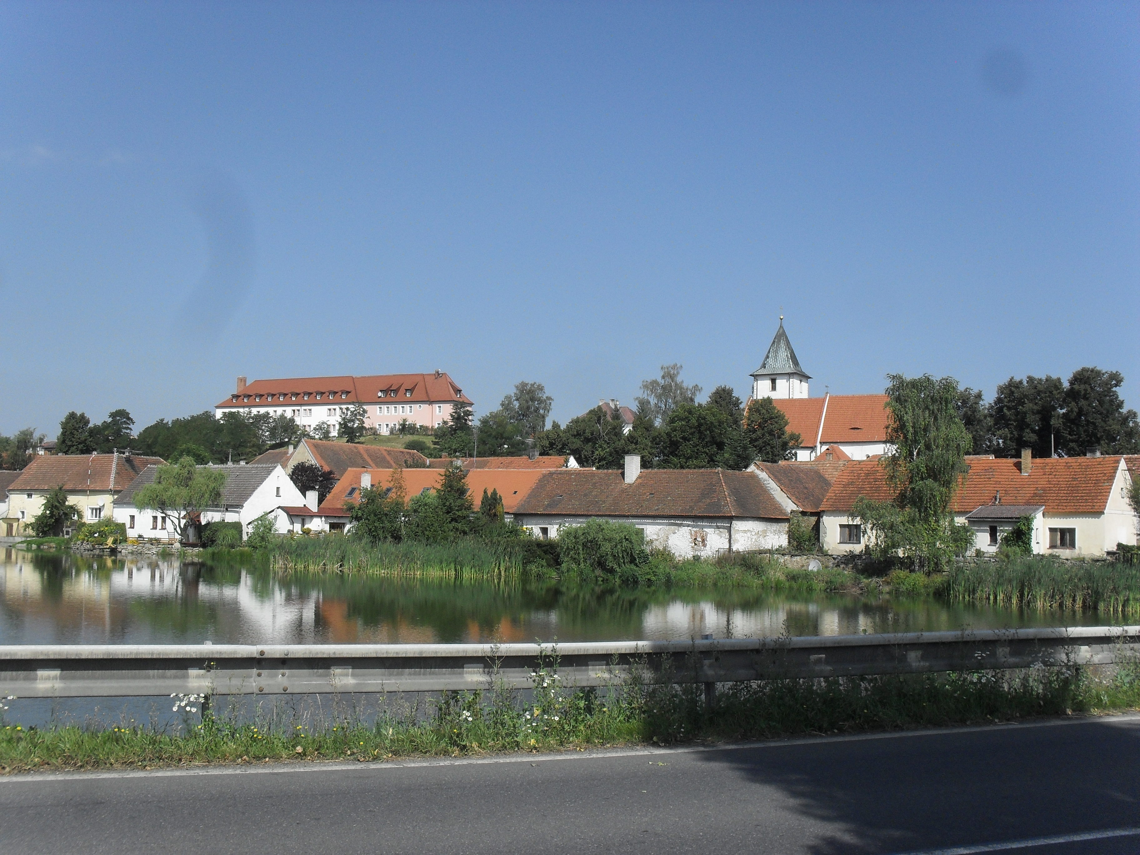 Fotografie pořízena v obci Velký Bor.